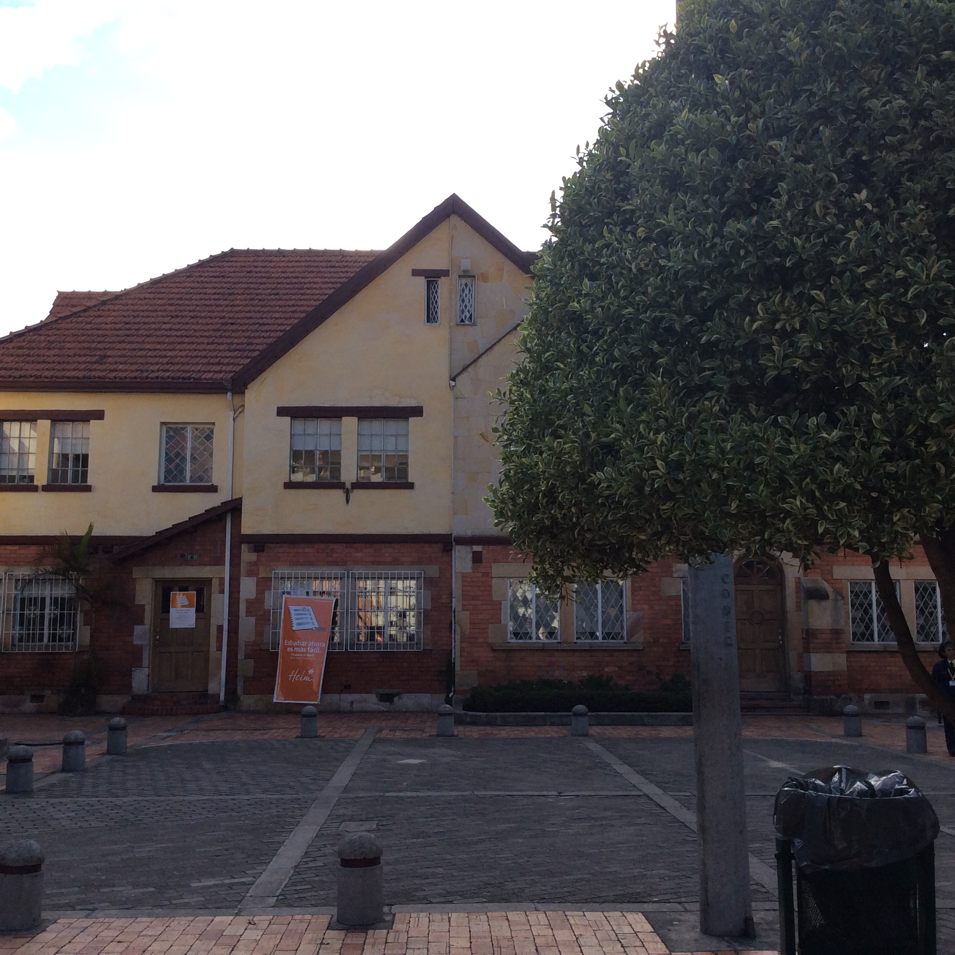 Sede Teusaquillo Unipanamericana Fundacion Universitaria